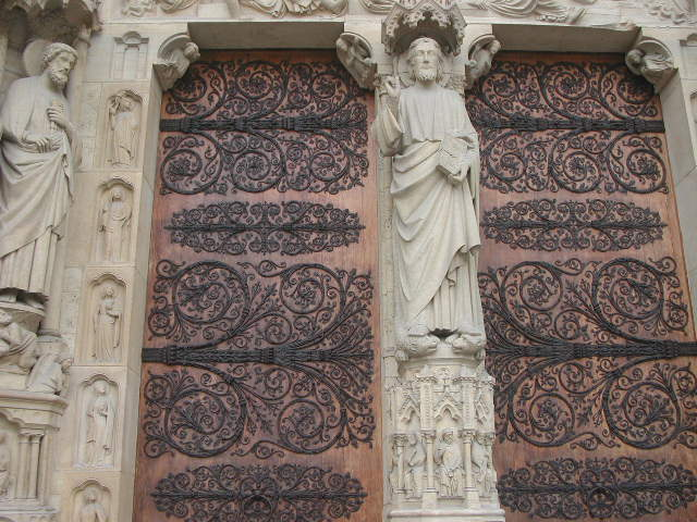 Notre-Dame de Paris. Pentures des vantaux du portail du Jugement réalisées en 1867 par le ferronnier d'art Pierre François Marie Boulanger.